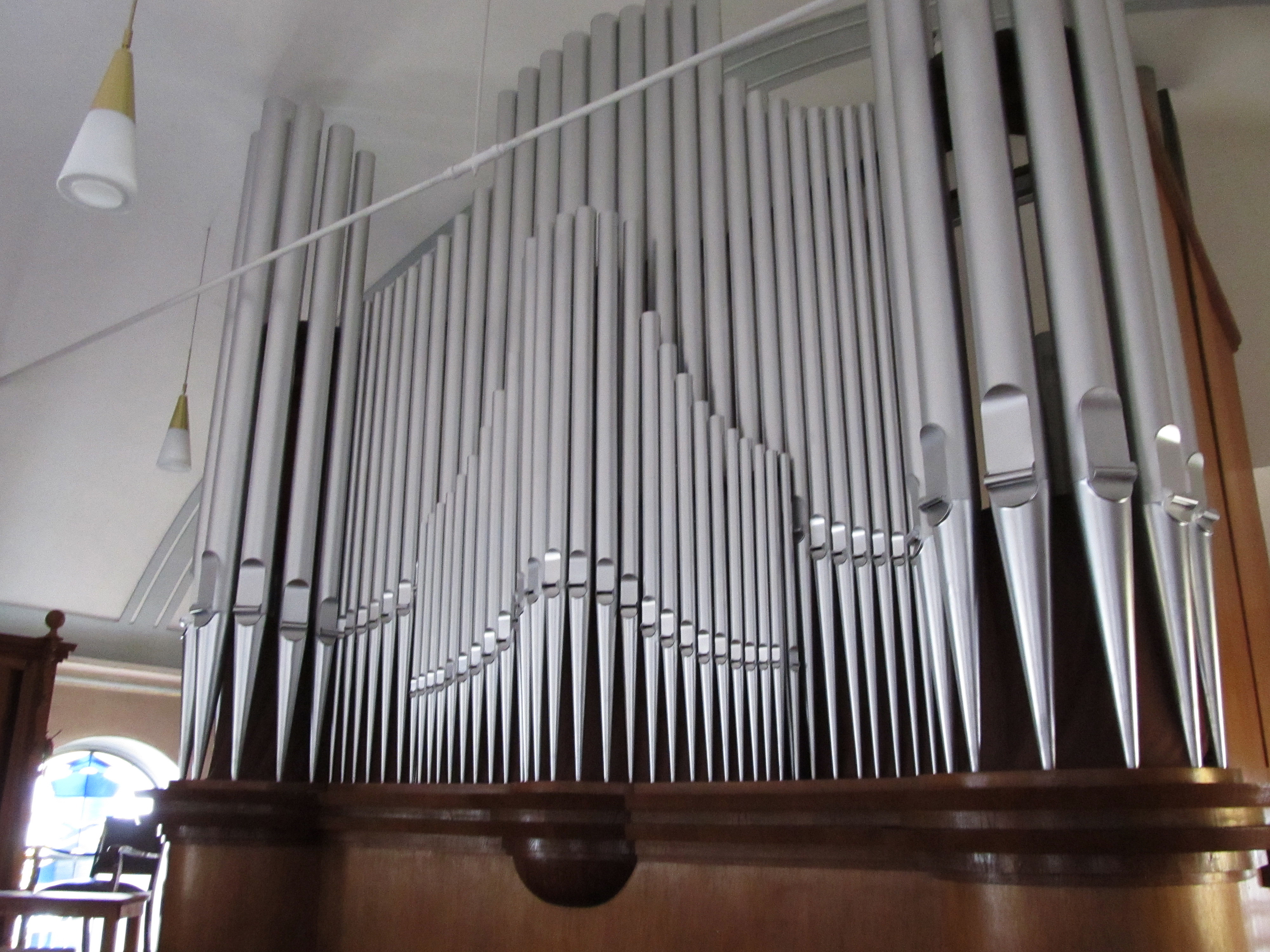 Die Orgel der St. Peterskirche in Ensheim, Saarland